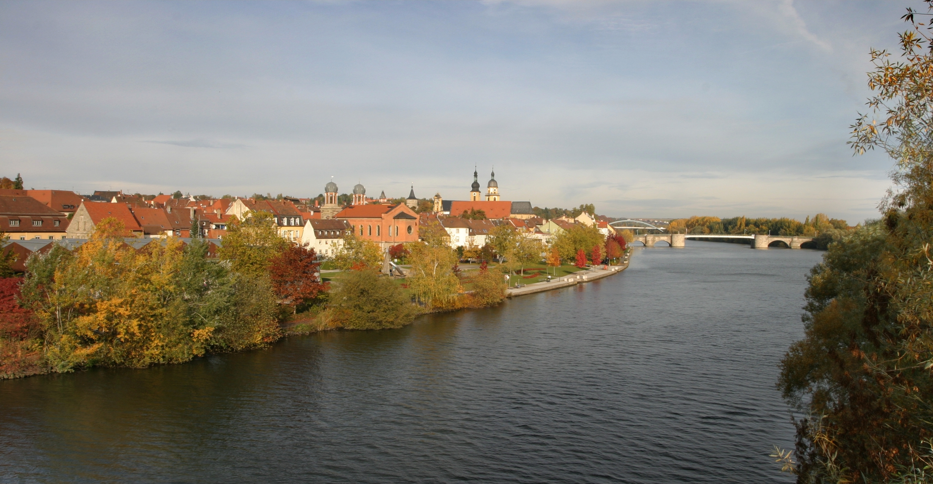 Stadtbild von Kitzingen am Main (detailliert)